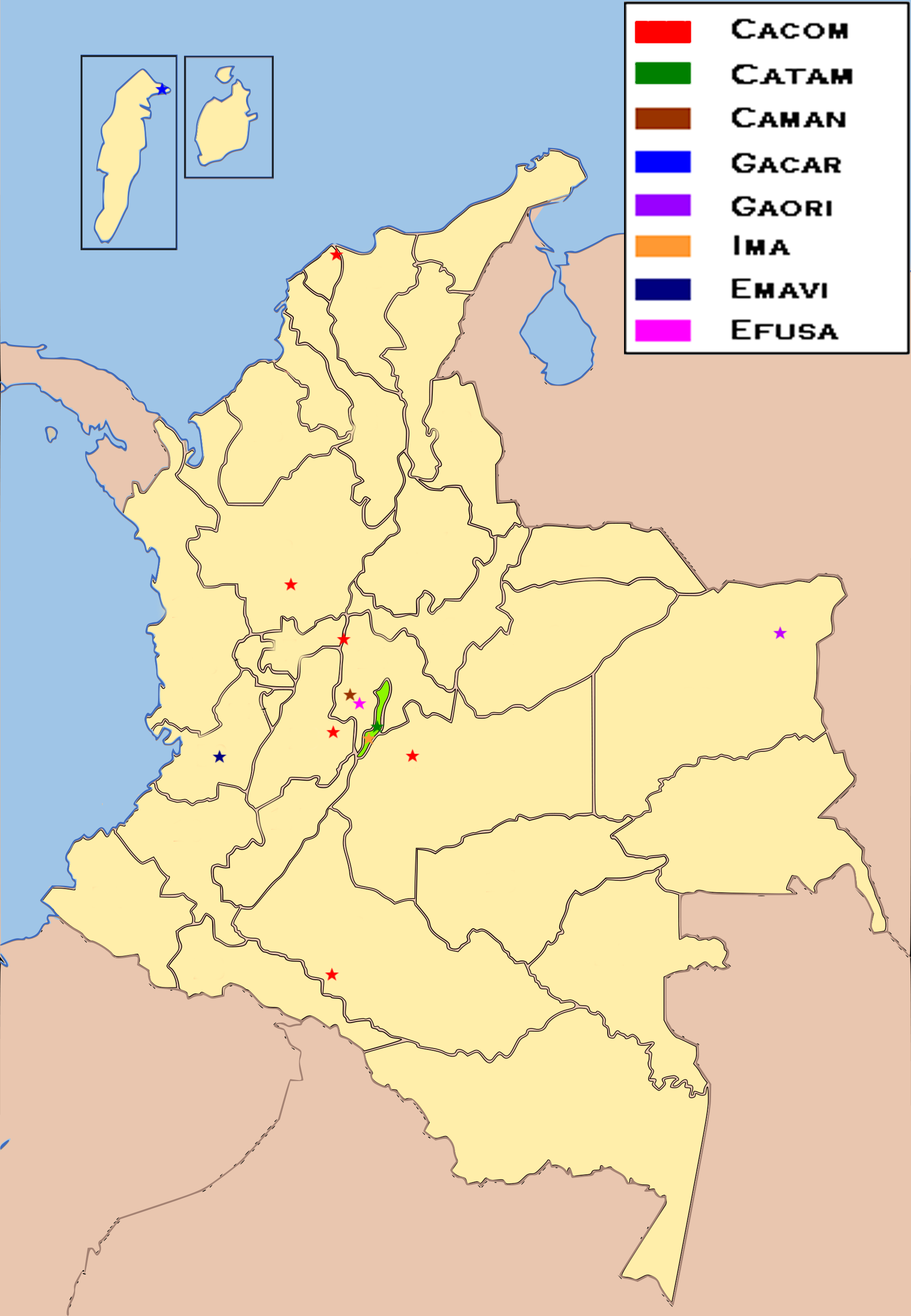 Mapa de las unidades de la fac